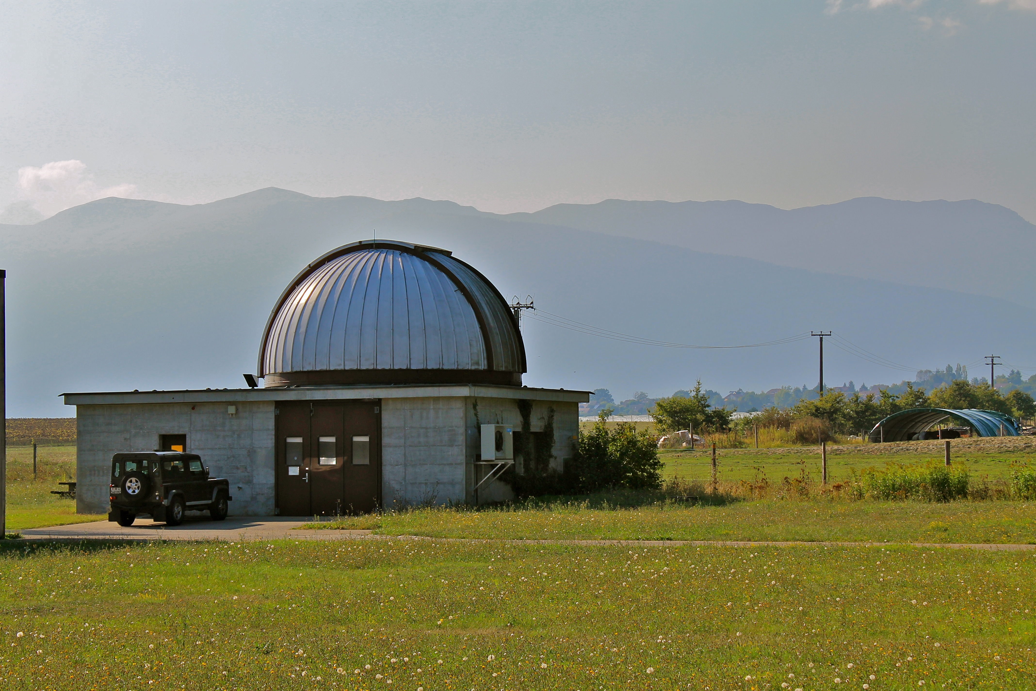 Randonnée Versoix - Chavannes-des-Bois - Commugny - Tannay - Mies